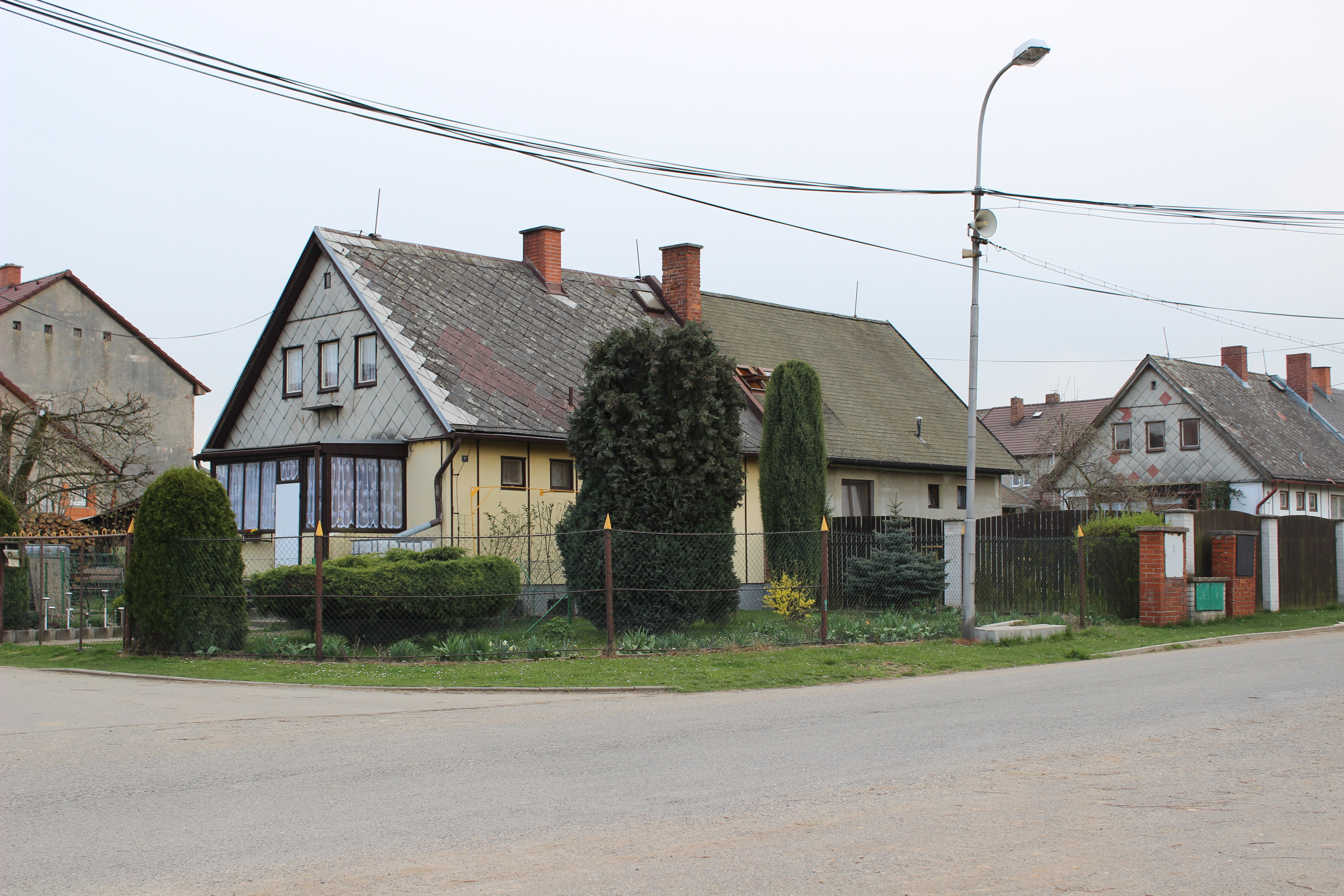 Dům číslo popisné 71 (vlevo) a 70 (vpravo) v Žebicích. This photograph was taken with a Canon EOS 600D.